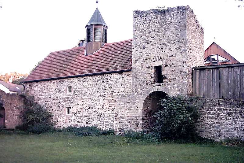 Der Torturm der Burg Dippach (Haßberge)